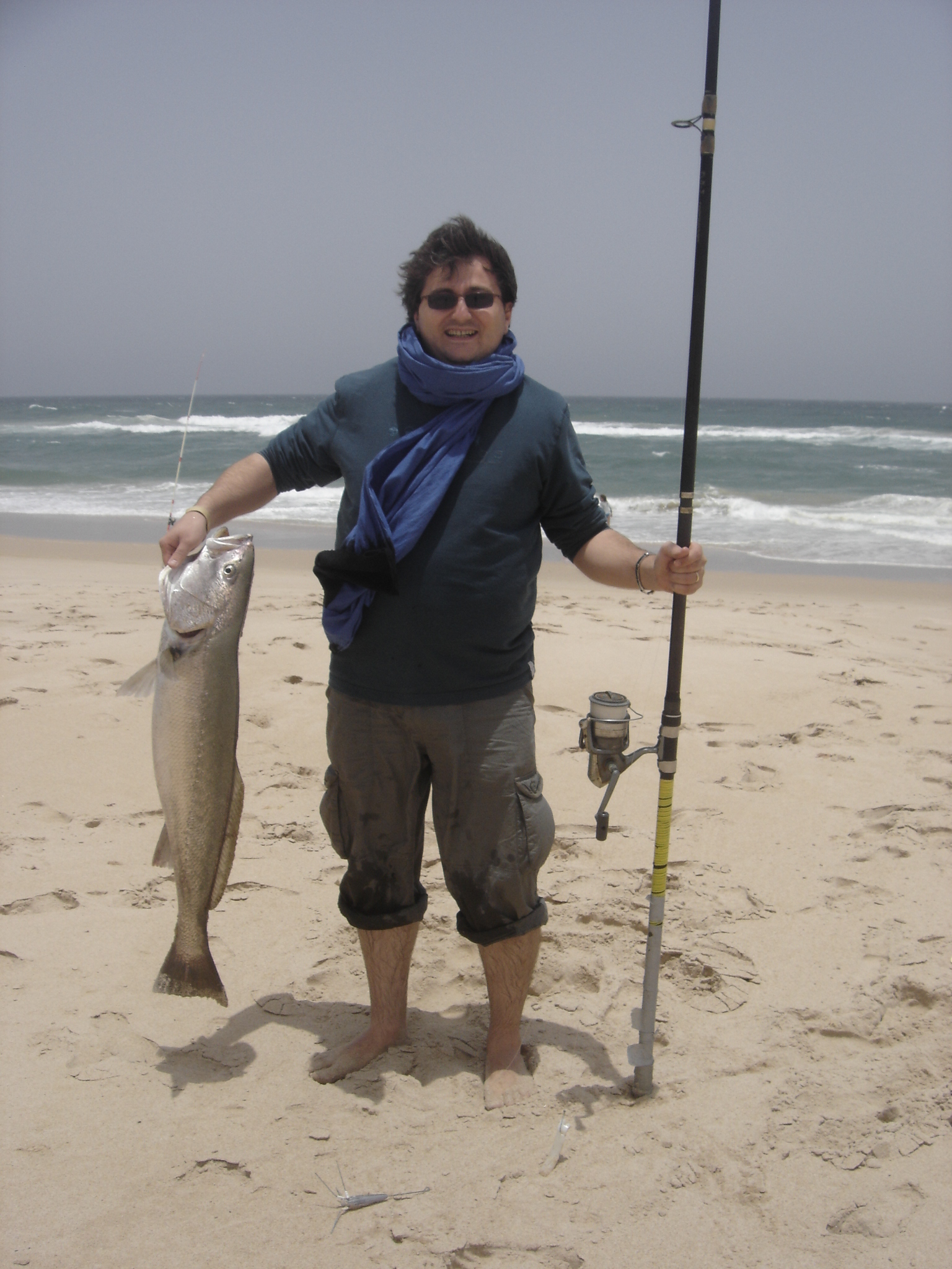 Pèche en surfcasting à Dakhla (Sahara occidental). Maigre de 8 kg, nommé aussi "courbine"